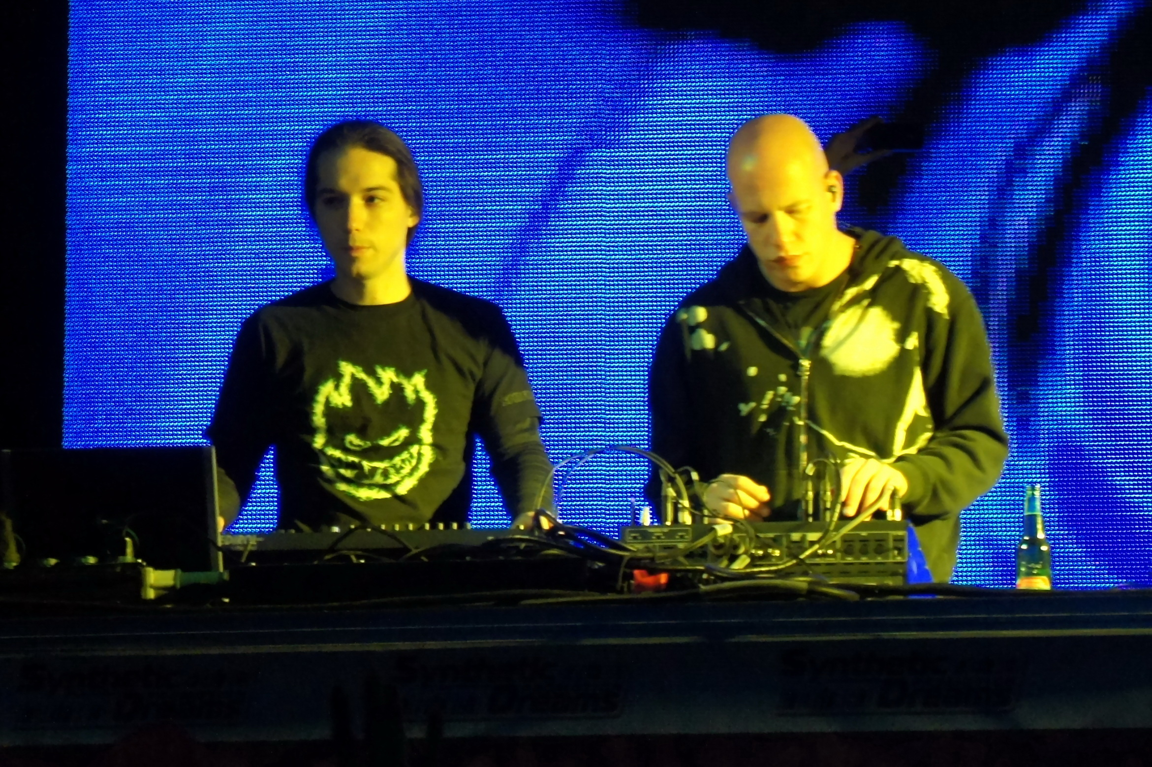 Выступление израильской группы Infected Mushroom на First Open Air-2011 в Торбеево под Москвой